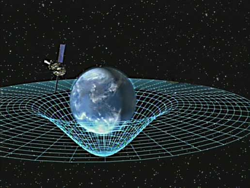 Grafik zur Darstellung des geodätischen Effekts